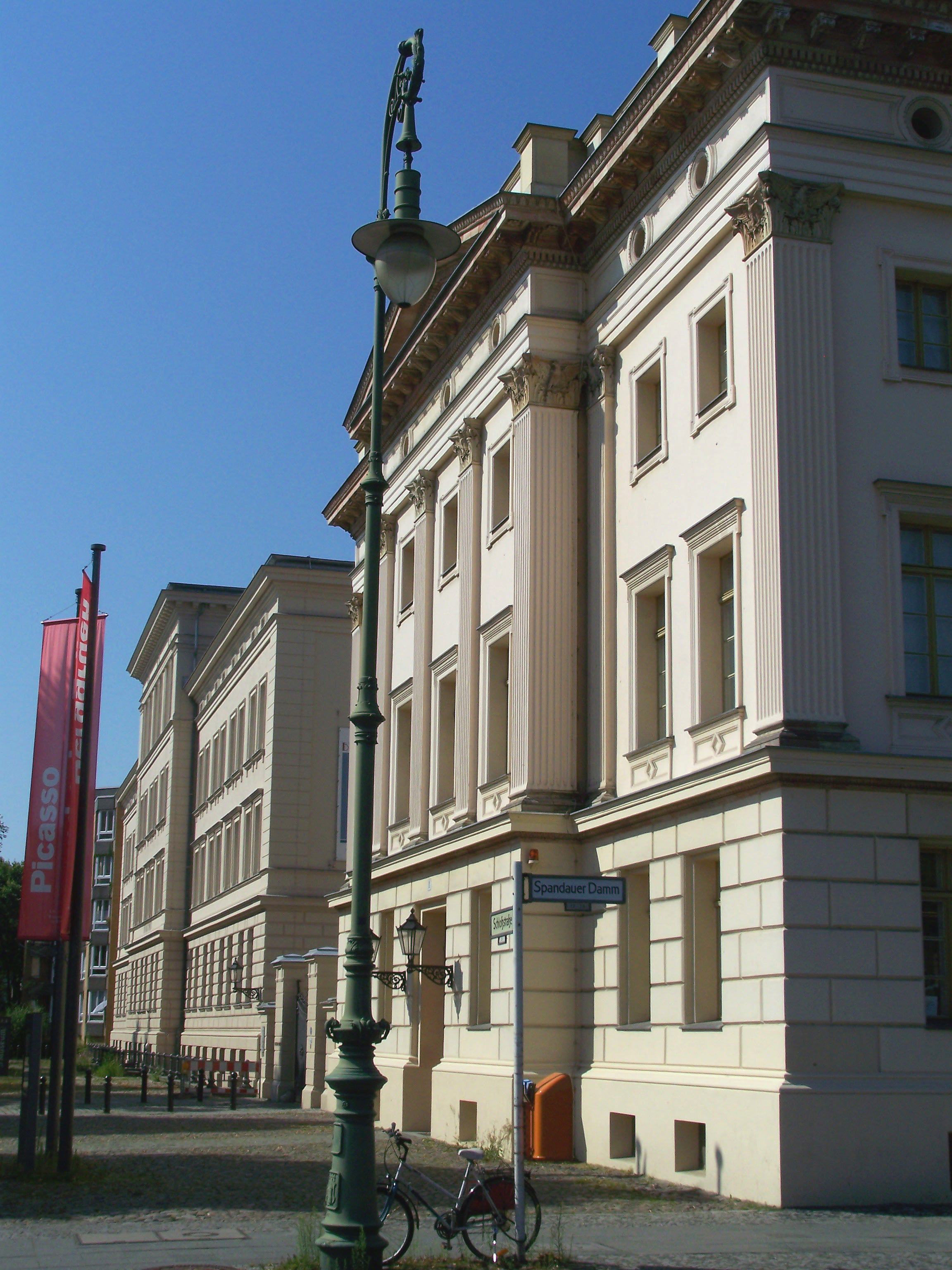 Schloßstraße Berlin-Charlottenburg; Blick auf westlichen Stülerbau und Bröhan-Museum